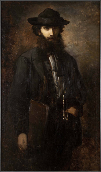 Depicted person: Ramon Tusquets i Maignon